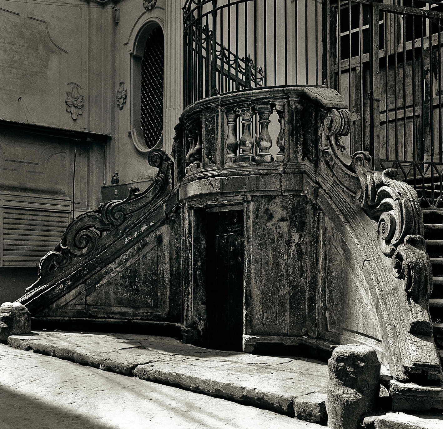 Scala in piperno della chiesa di San Nicola a Nilo, Napoli - Italia.